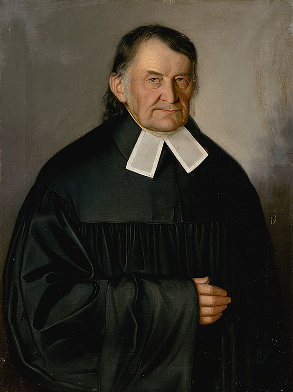 Samuel Reuss (1783-1852) - etnograf, historik, evanjelický kňaz